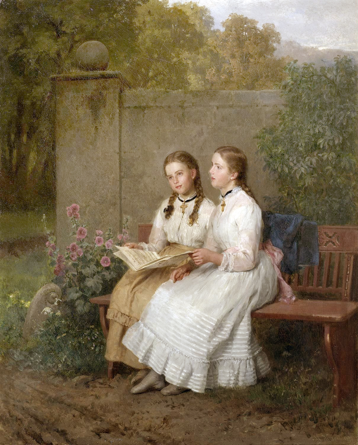 Zwei singende junge Mädchen auf einer Parkbank. 1873. Öl auf Leinwand. 56 x 48